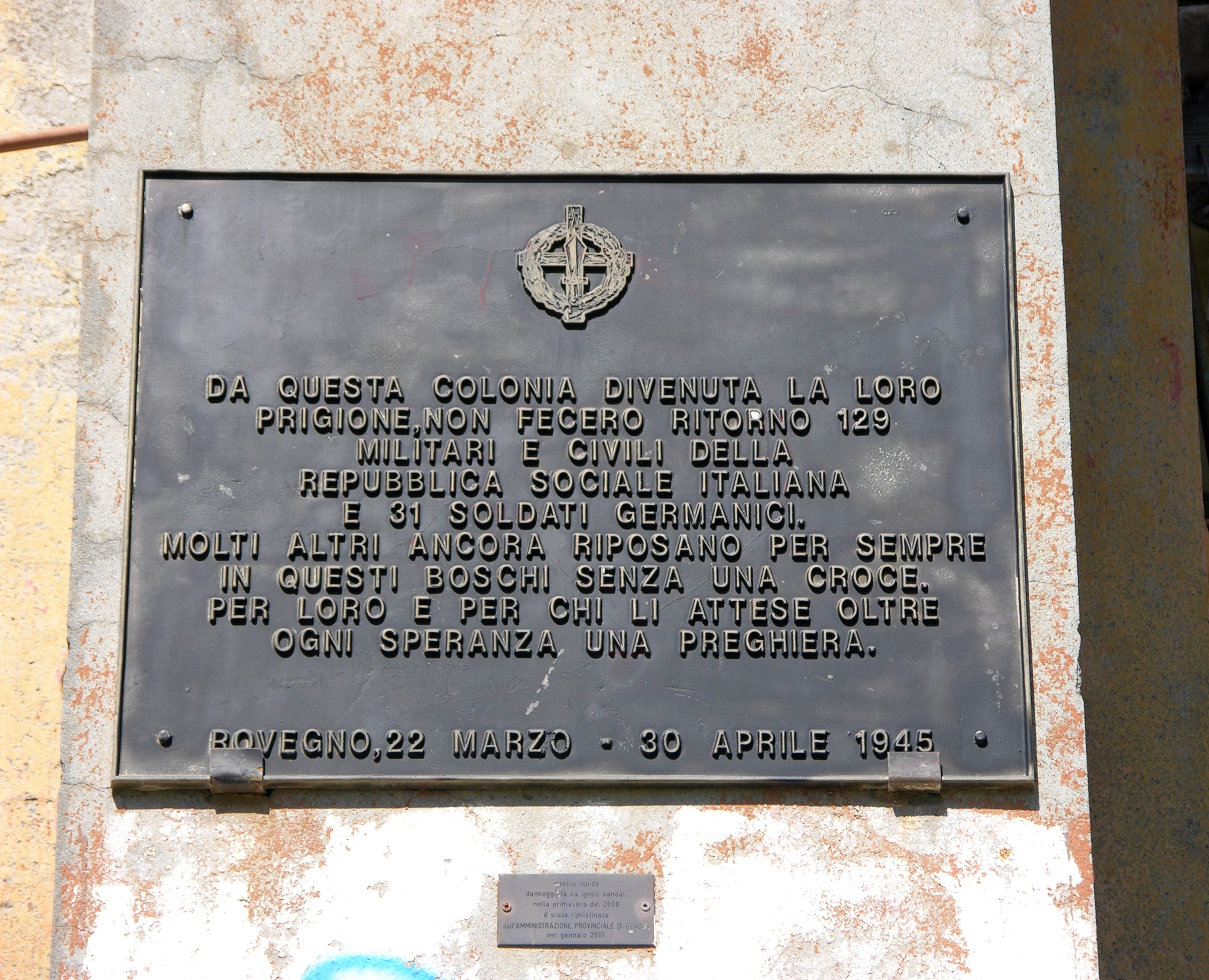 Targa della Colonia di Rovegno, Genova, Italy